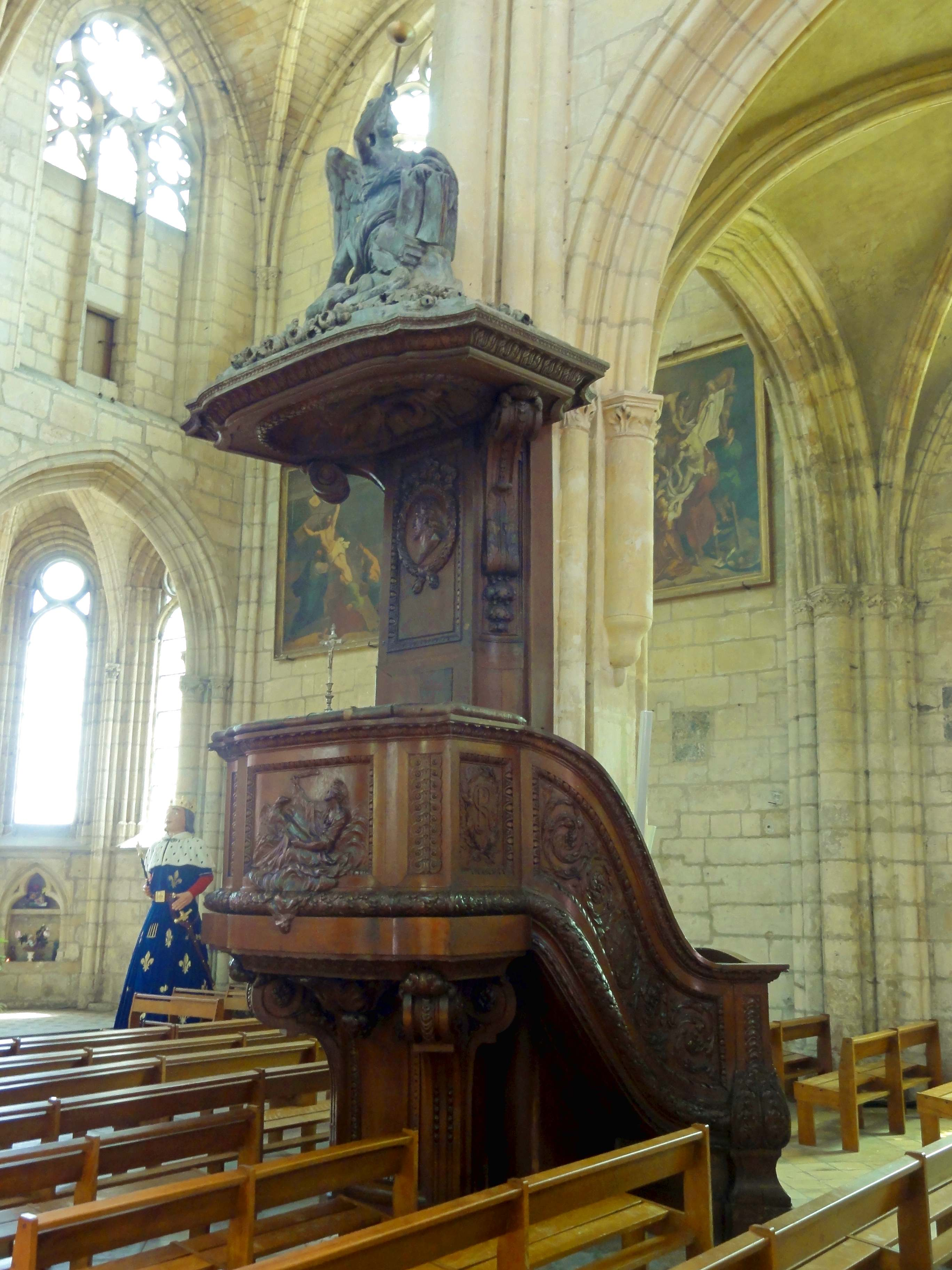 Chaire à prêcher, côté nord-ouest.